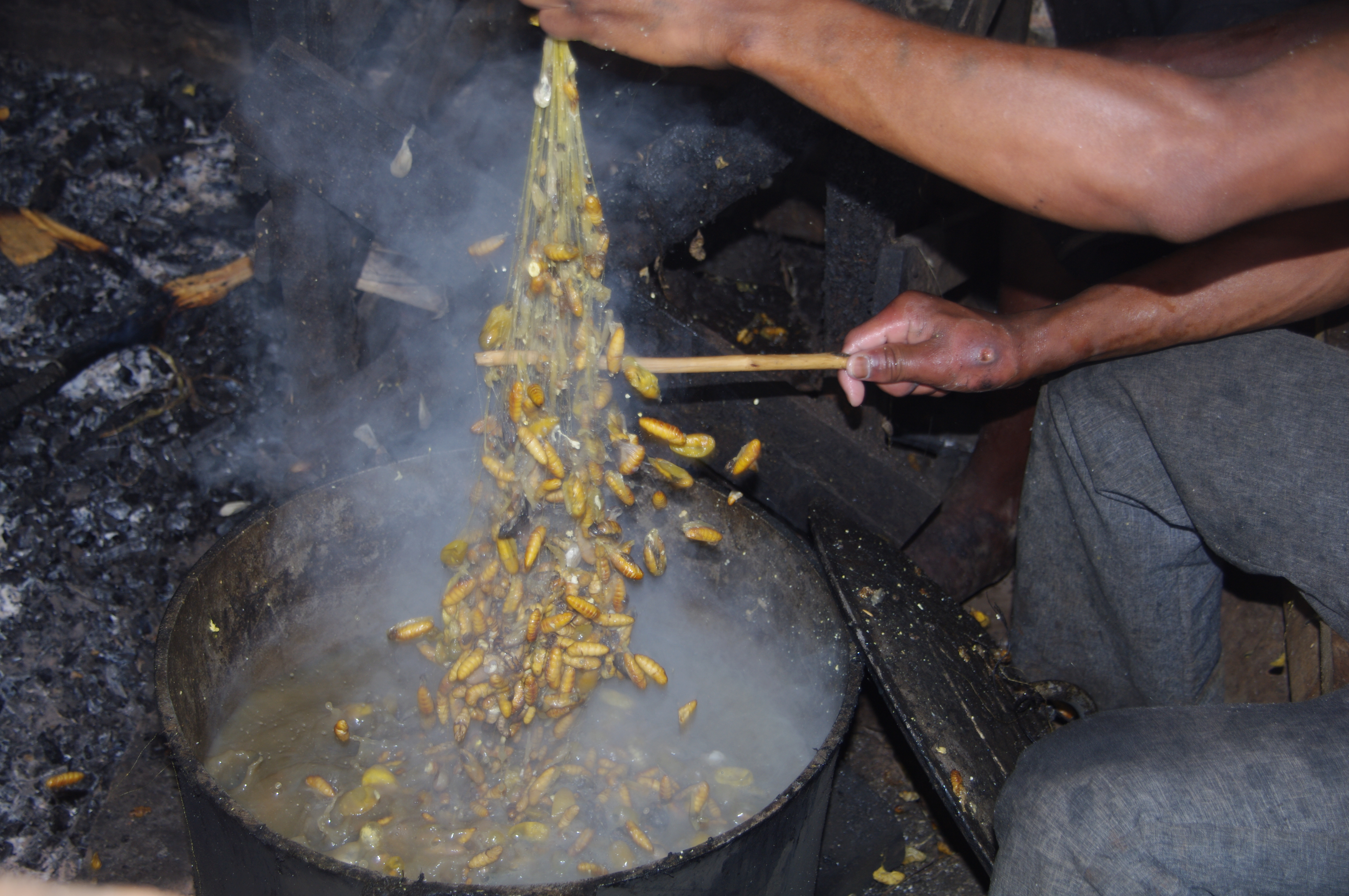 Séparation des vers et du fil.